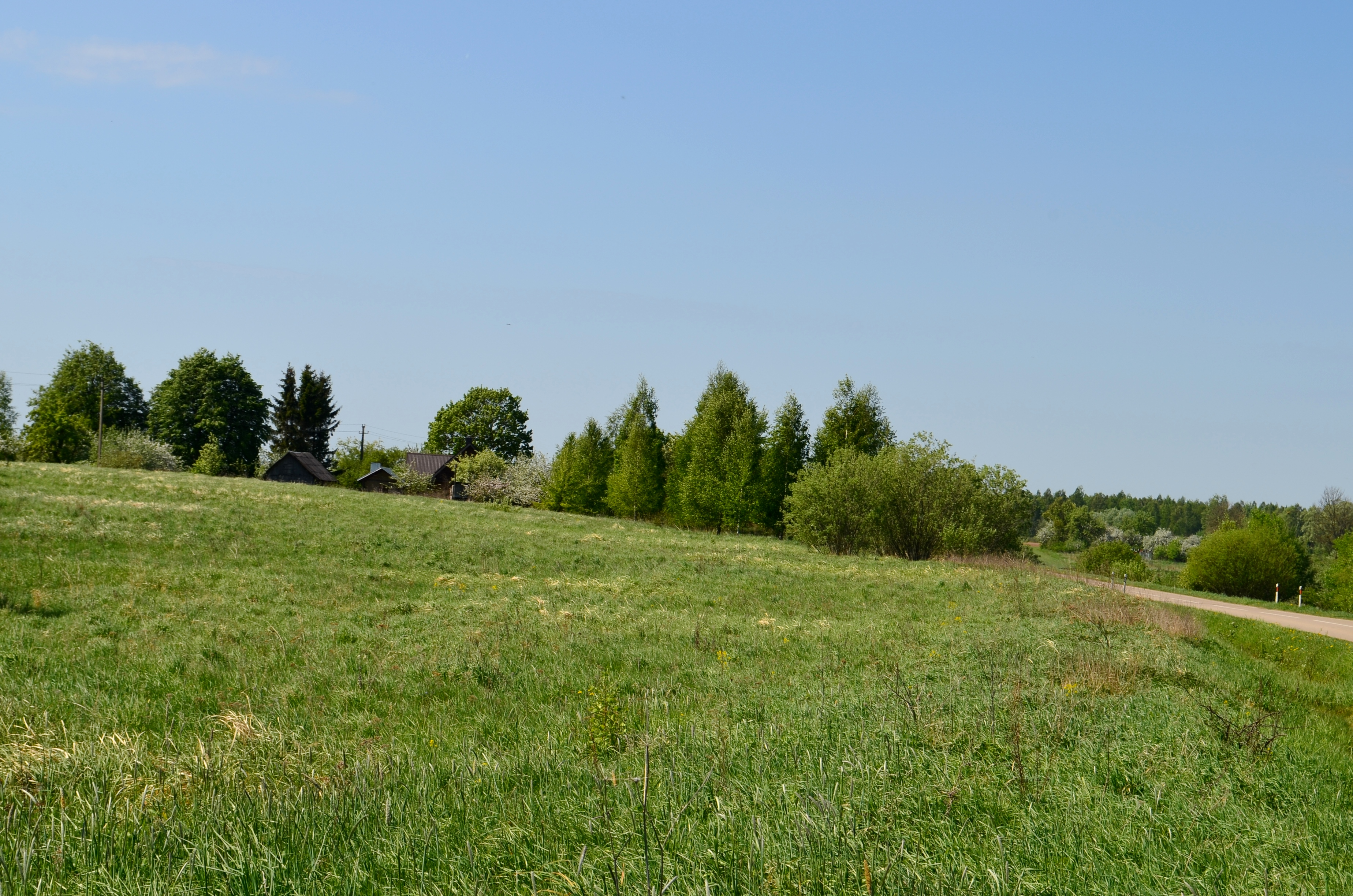 Kaspariškiai, Kavarsko sen., Anykščių raj.